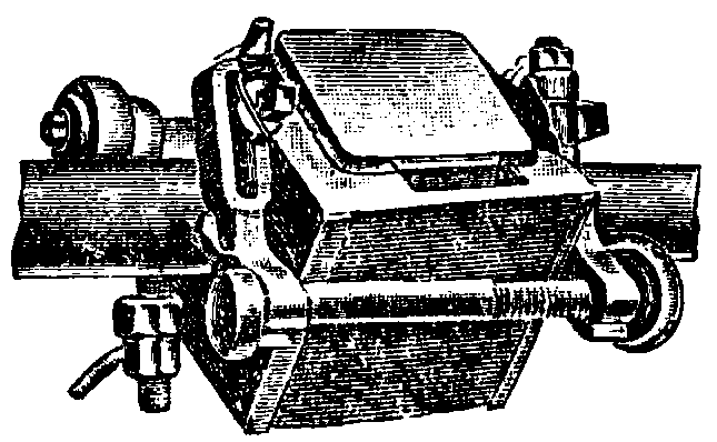 Зажимный аппарат для алюминотермии